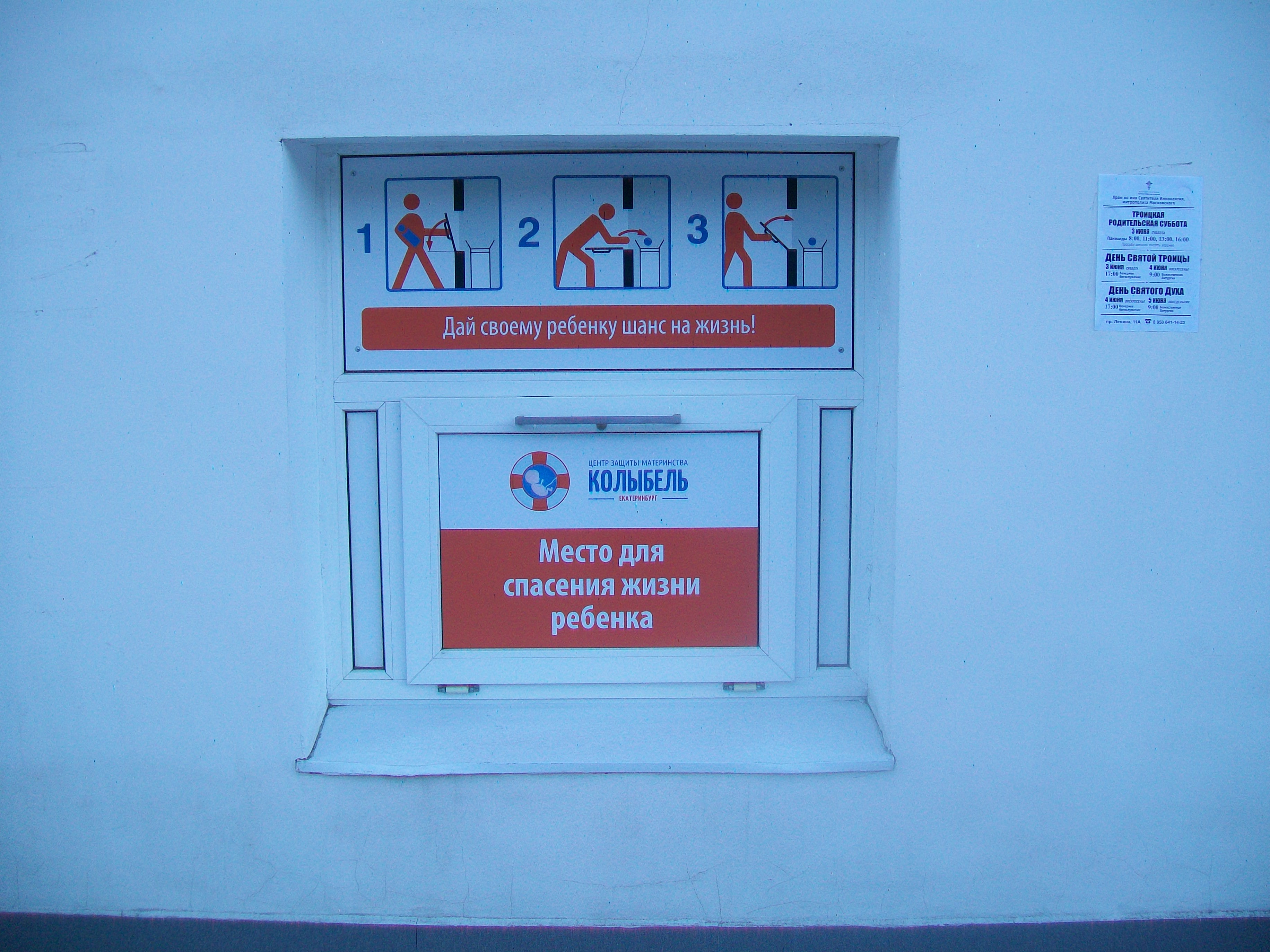 Бэби-бокс в Екатеринбурге при храме во имя Святителя Иннокентия (май 2017 года). Вид с улицы, откуда можно положить ребенка